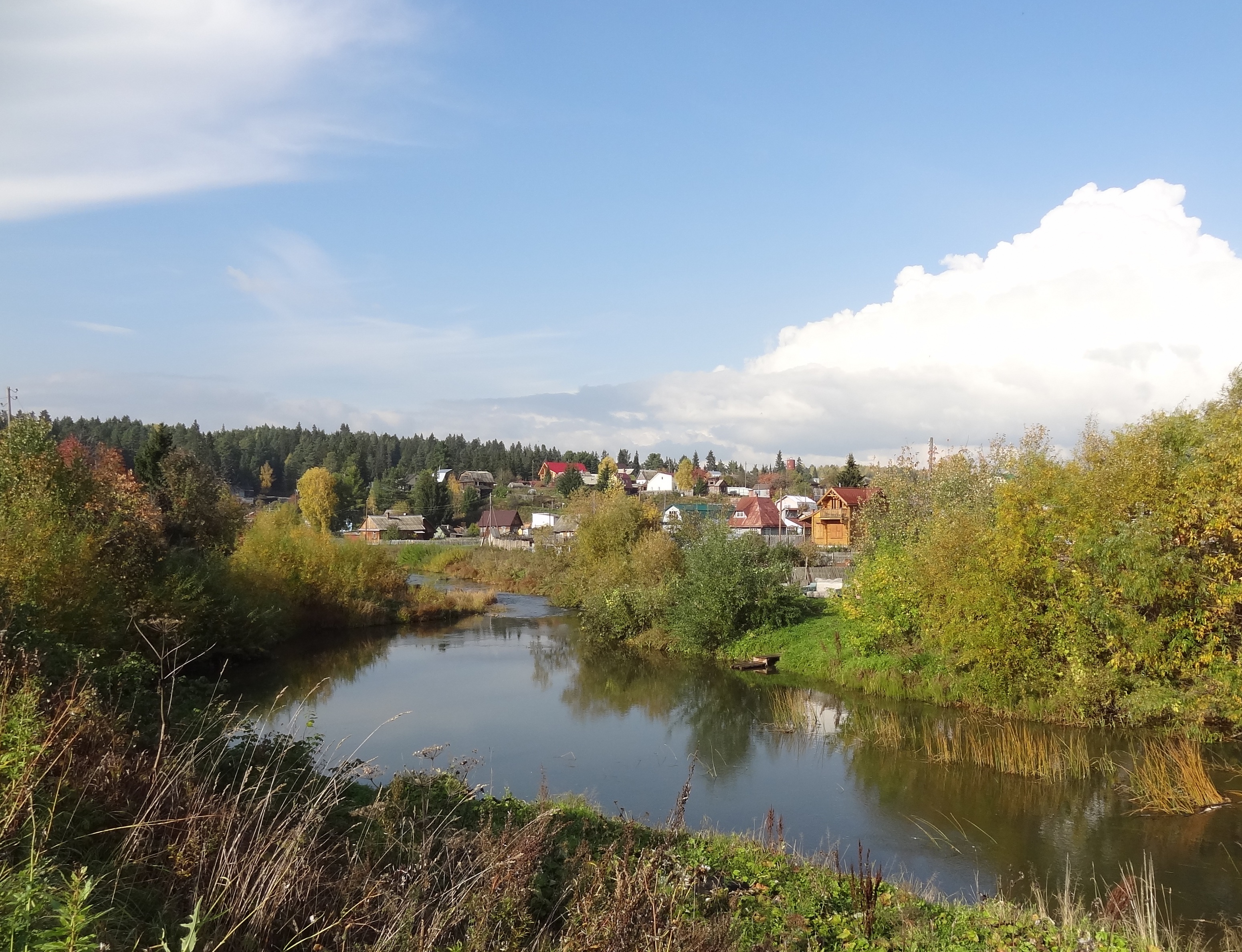 Заварзино